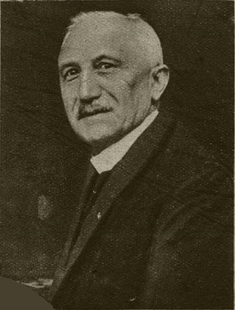 Portret van Alexander Franciscus van Beurden